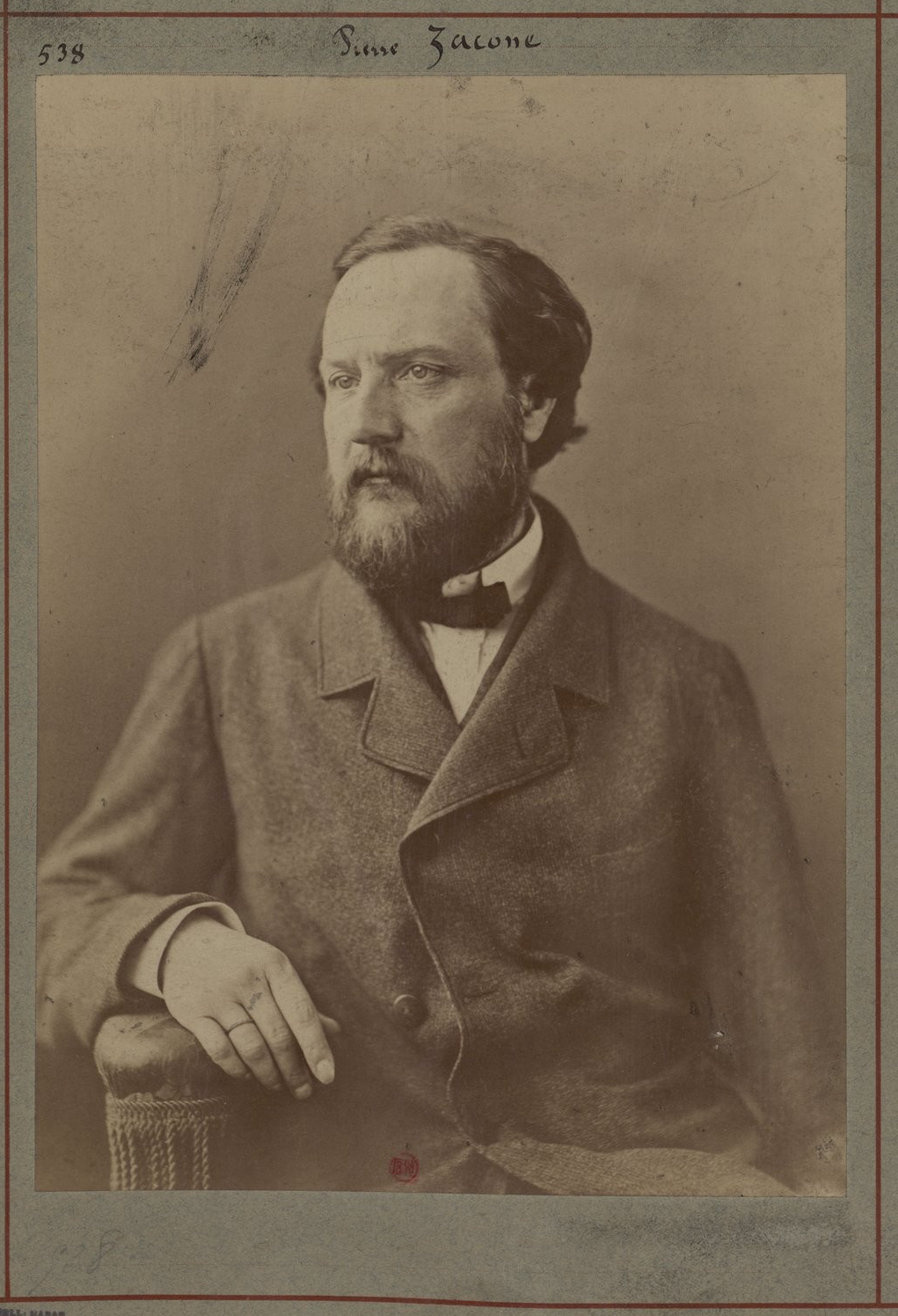 Pierre Zacone